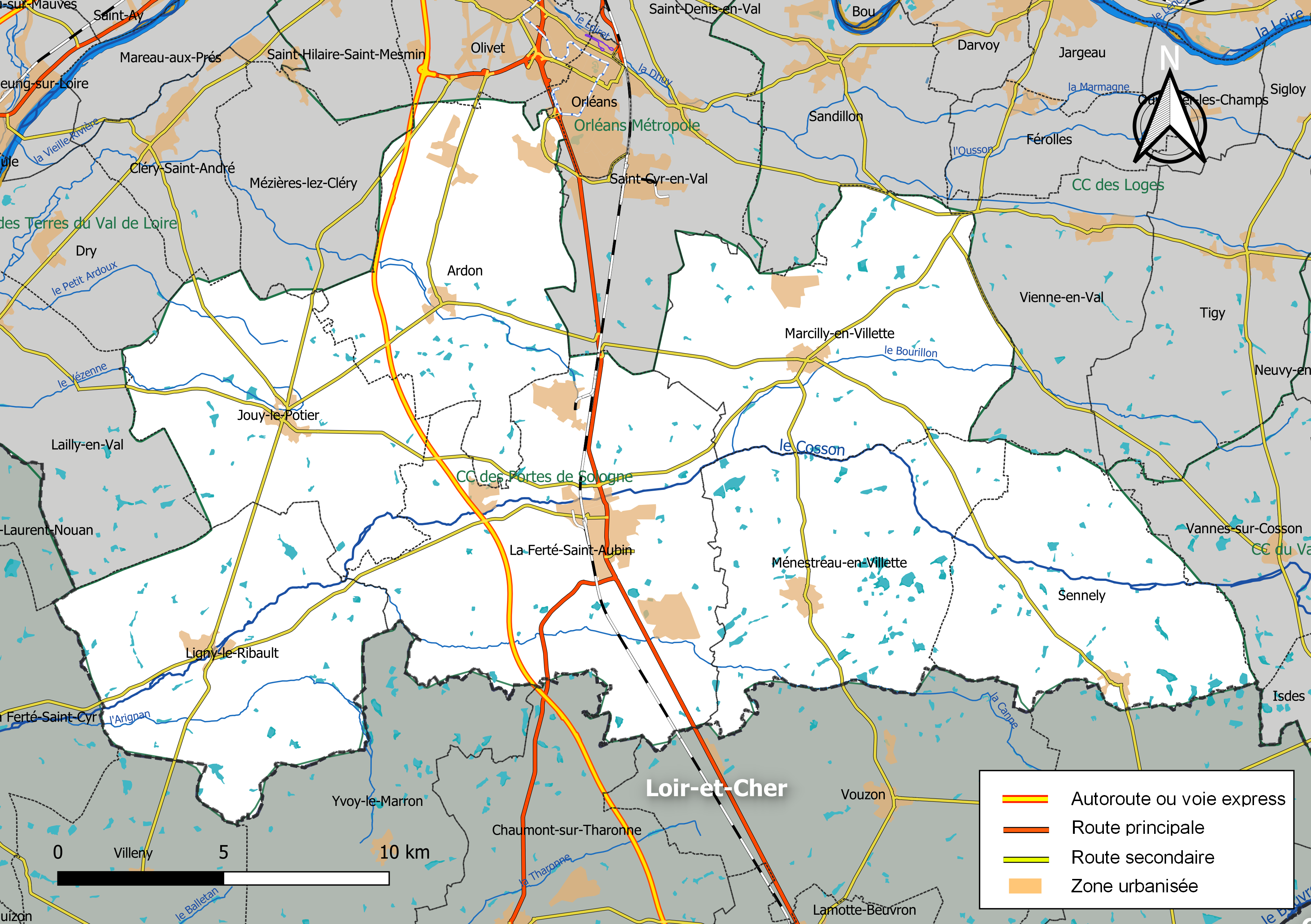 Carte géographique de la communauté de communes des Portes de Sologne, département du Loiret, France. Composition au 1er janvier 2019.